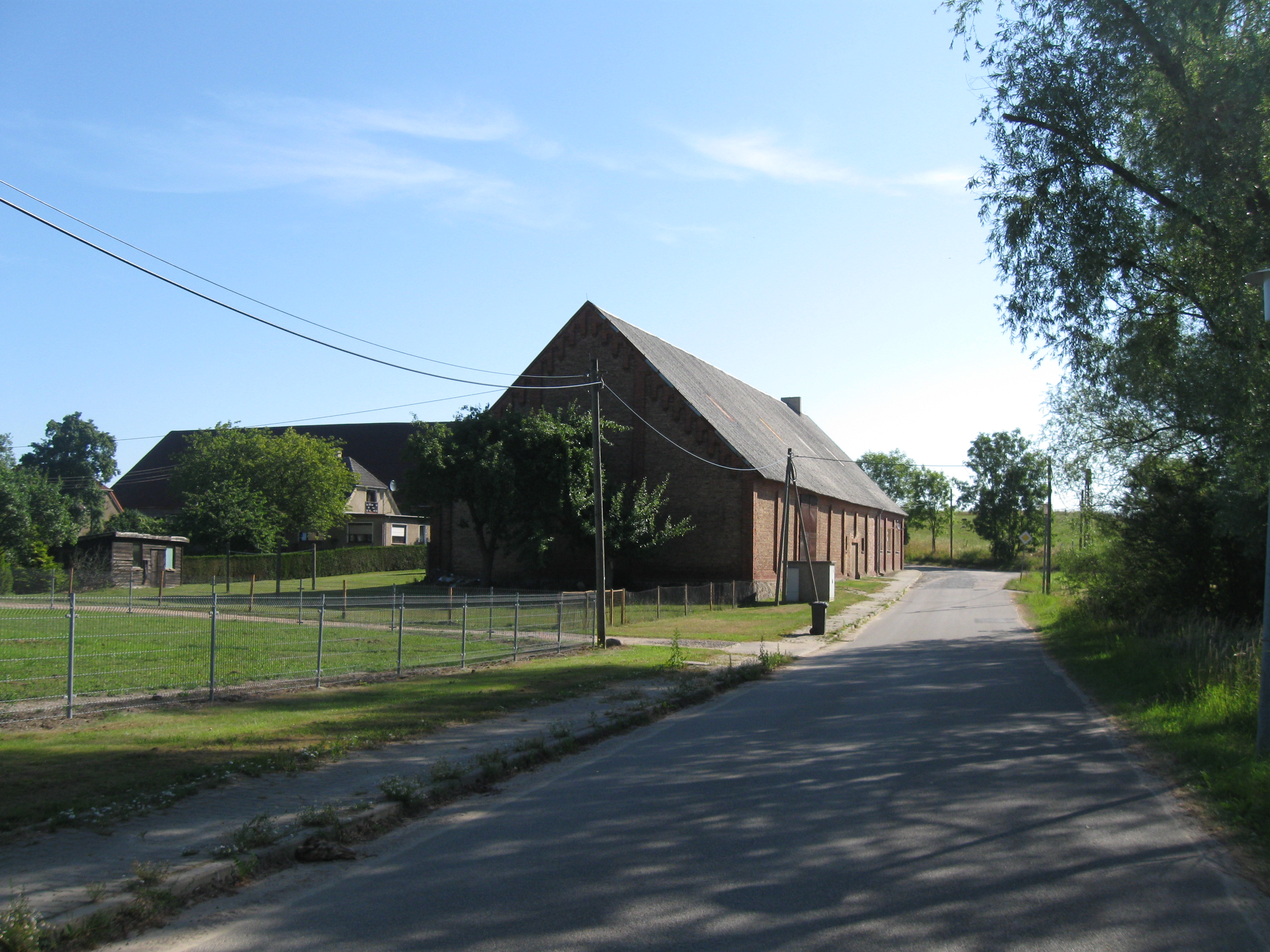 Pinnower Ortsmitte nahe dem Dorfteich.